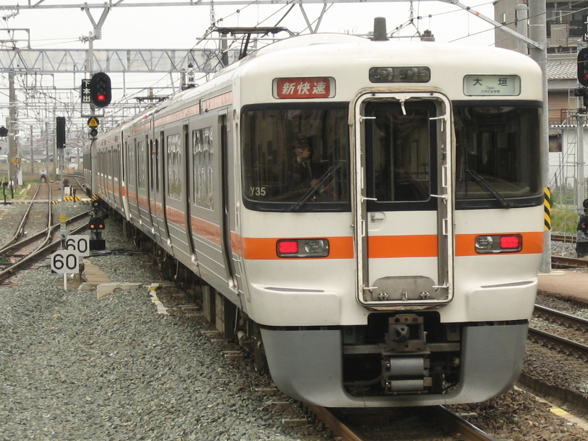 東海旅客鉄道313系